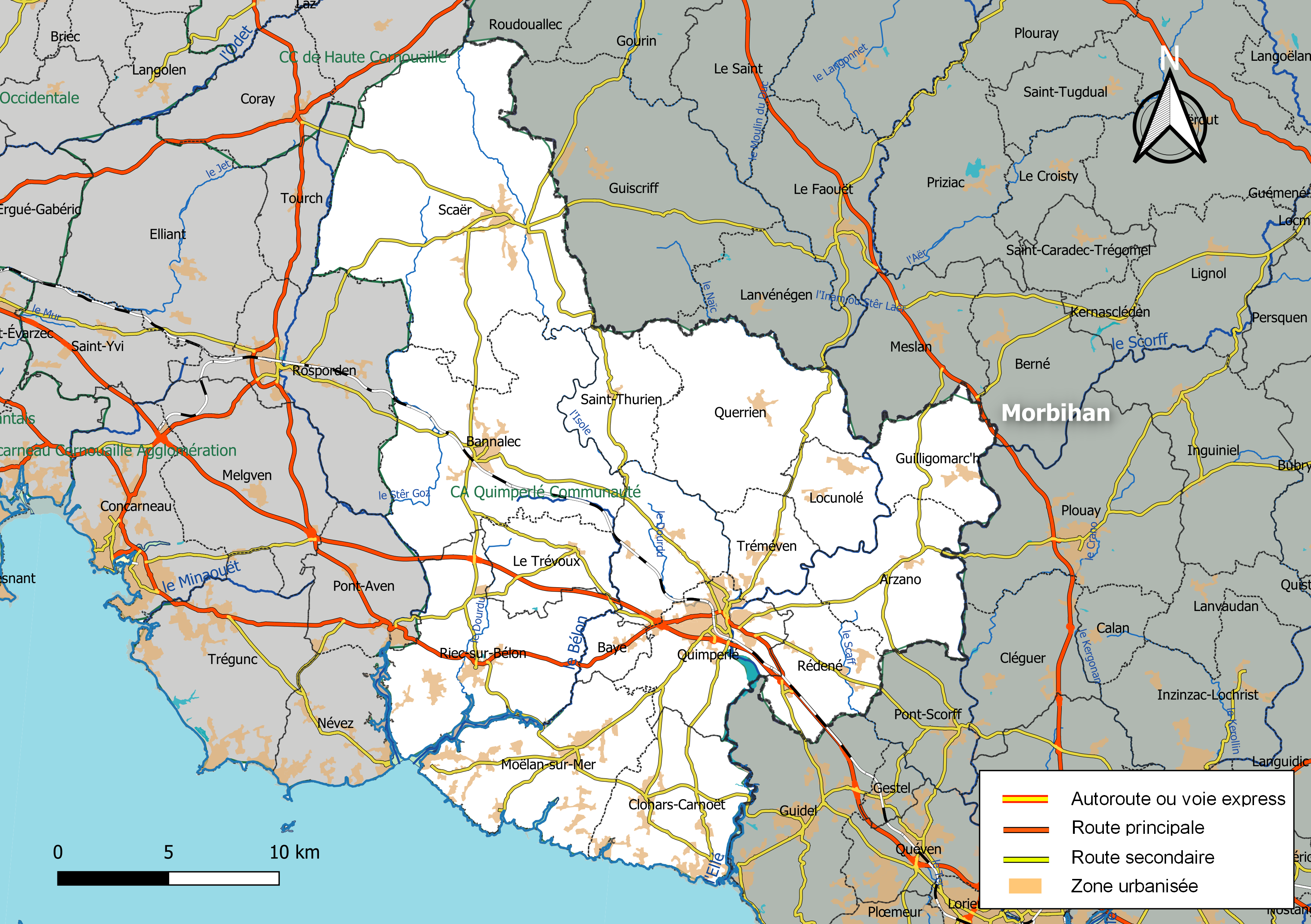 Carte géographique de l'intercommunalité Quimperlé Communauté, département du Finistère, France. Composition au 1er janvier 2019.